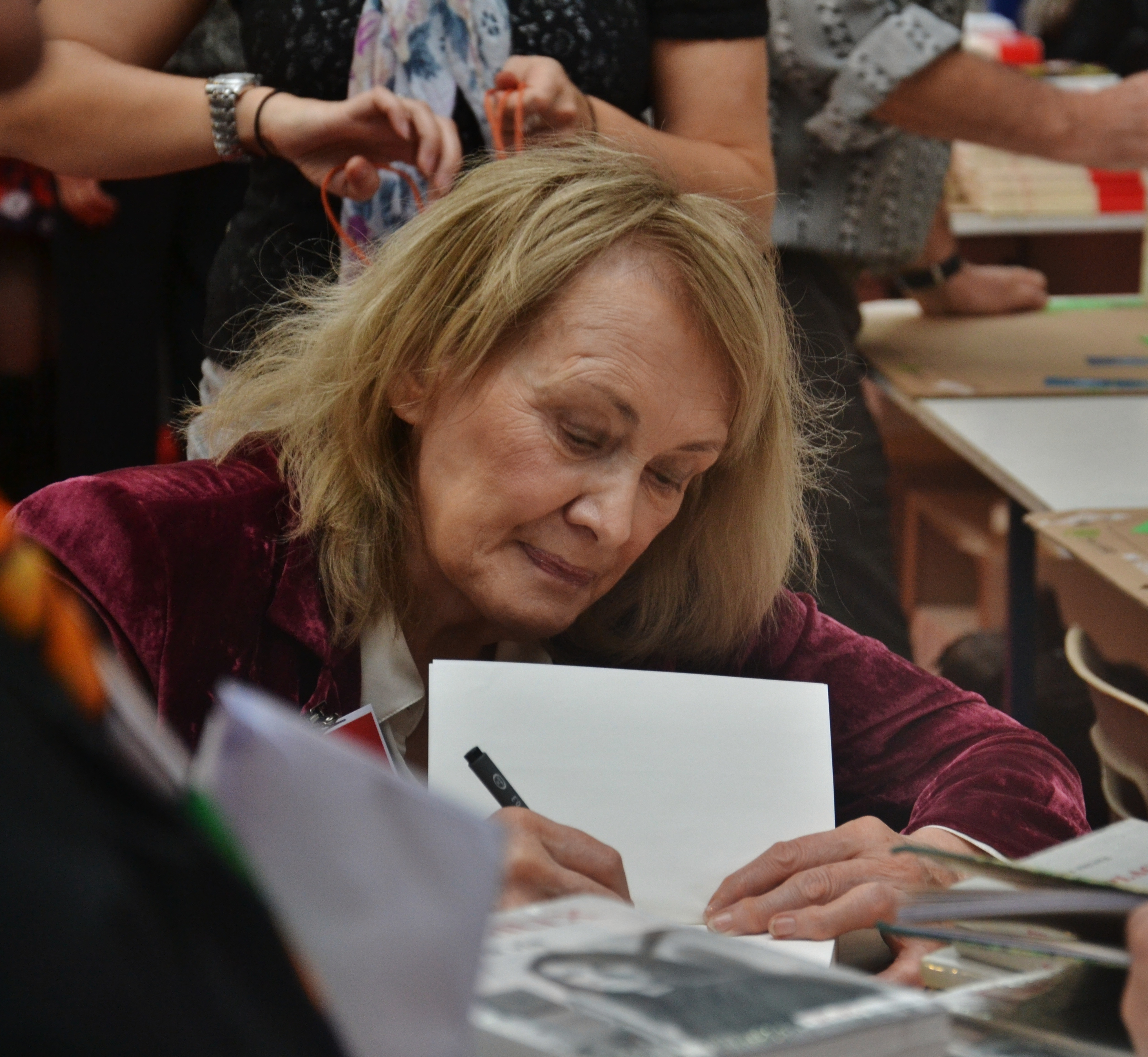 Annie Ernaux à la 30e Foire du livre de Brive-la-Gaillarde